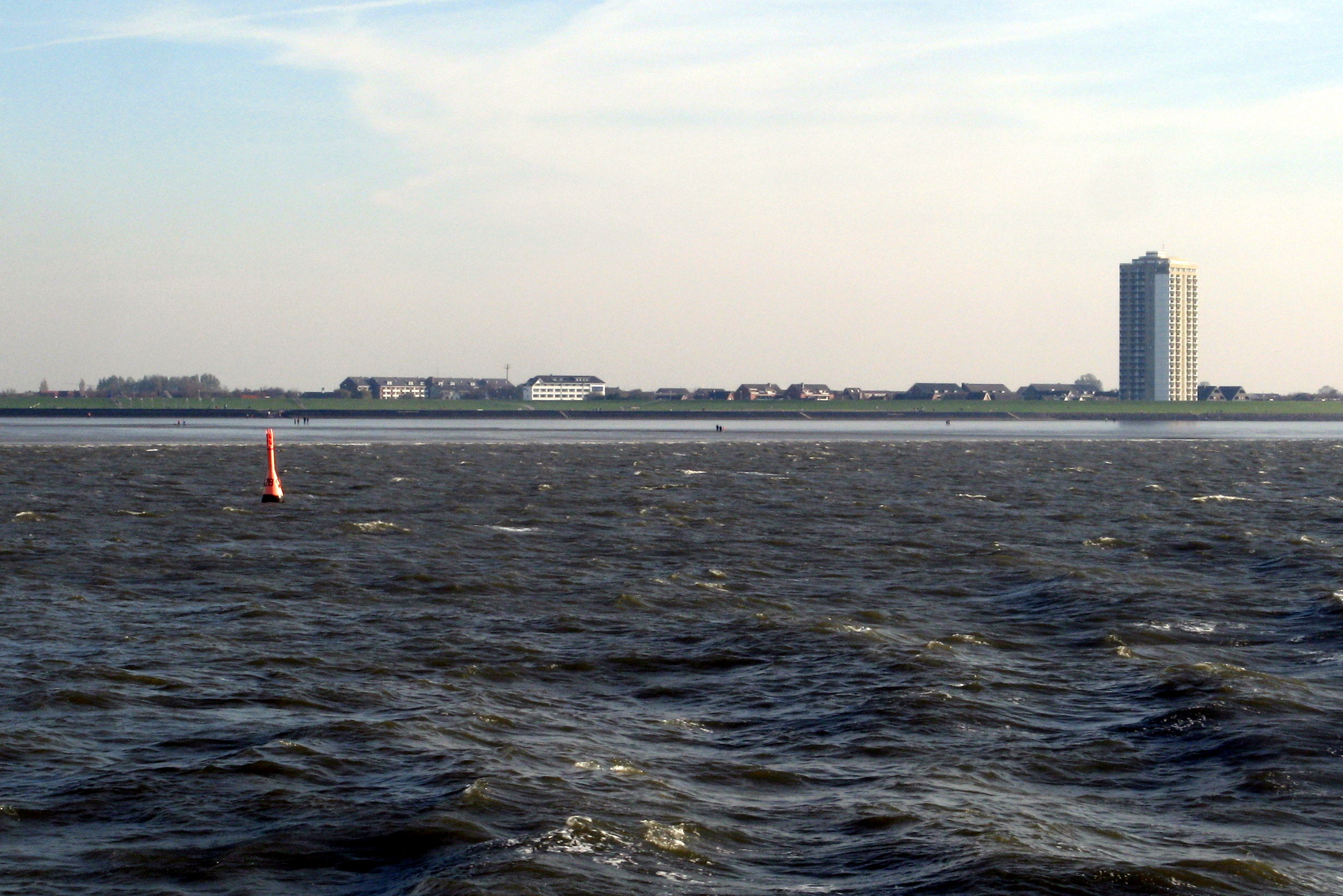 Fahrwassermarkierung im Süderpiep, Priel vor Büsum, Schleswig-Holstein bei Niedrigwasser.